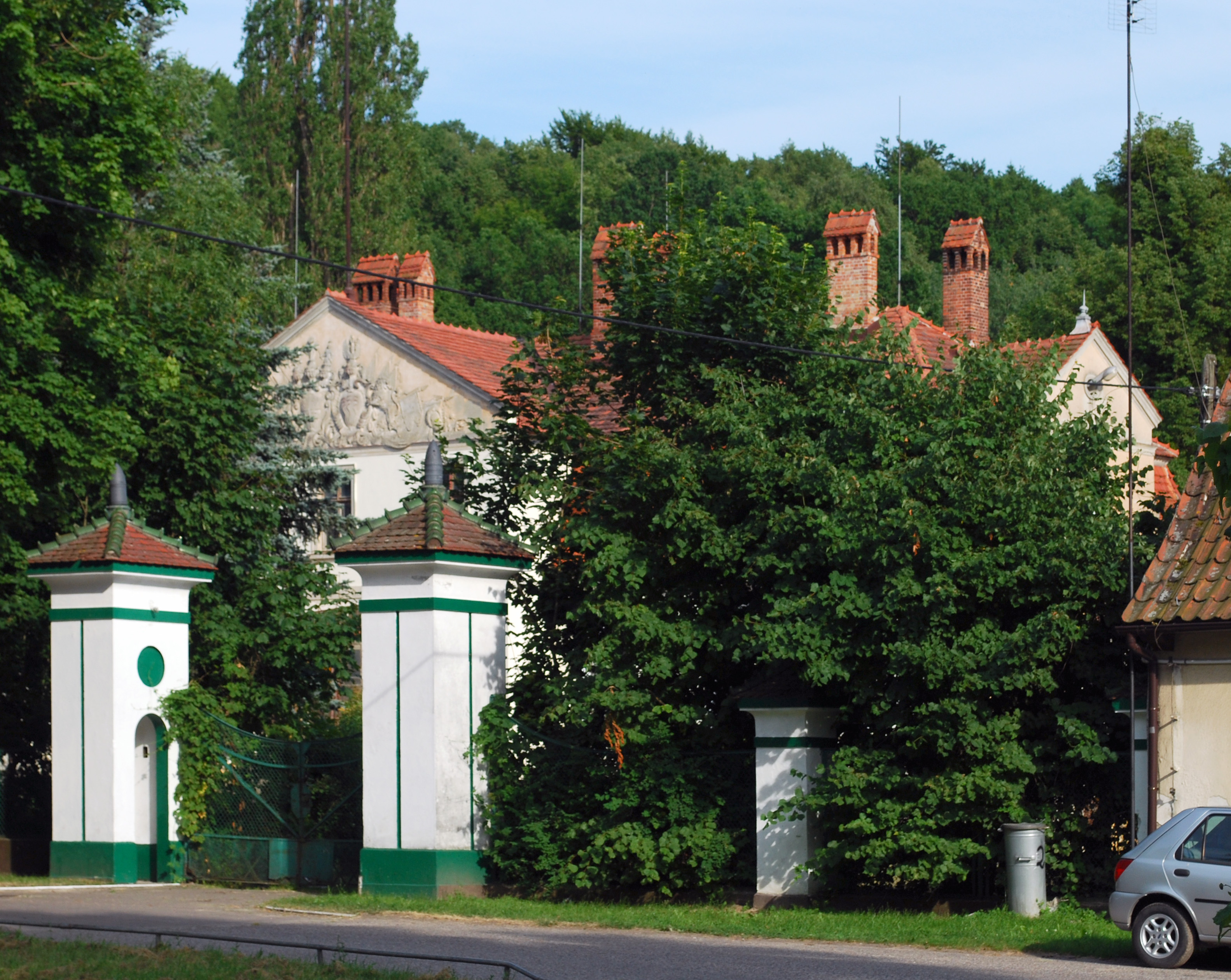 Pałac Wilhelma II Hohenzollerna w Kadynach.